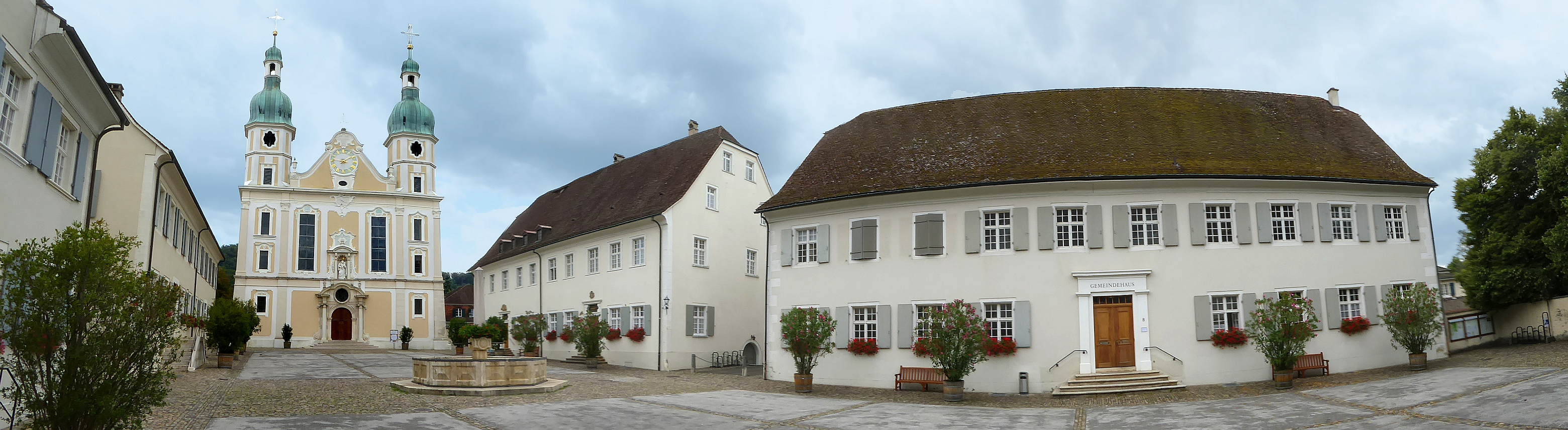 Domplatz von Arlesheim